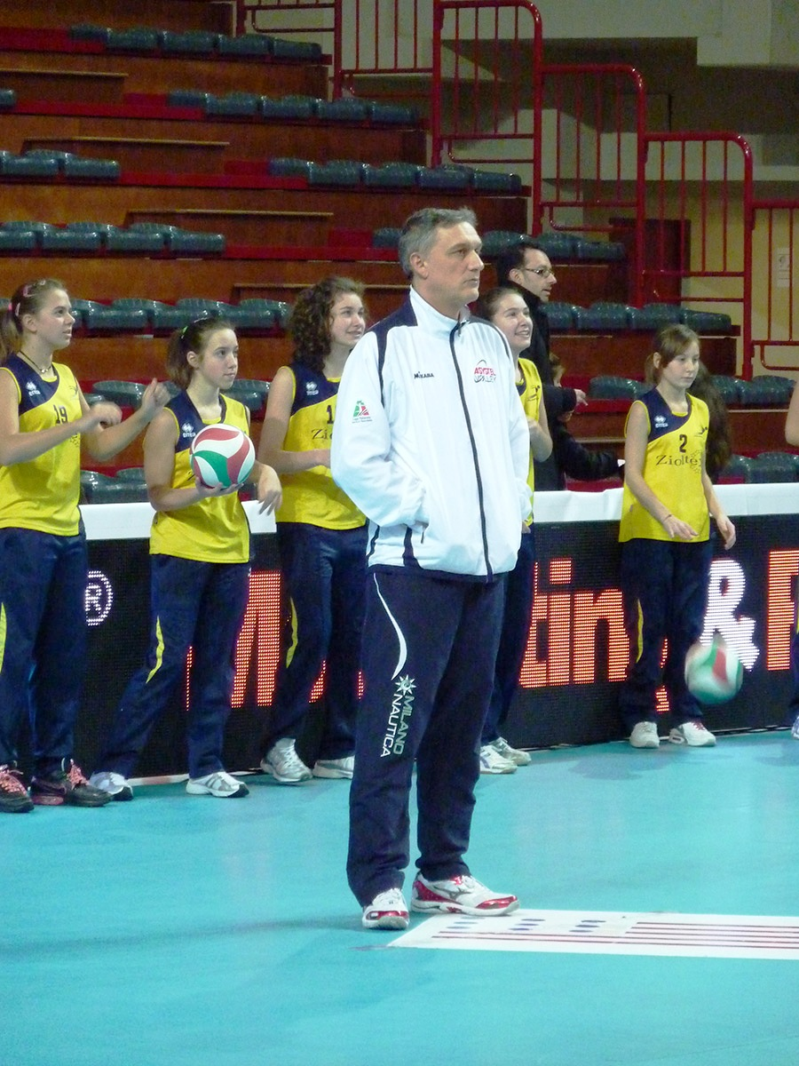 Giovanni Caprara, allenatore pallavolistico italiano